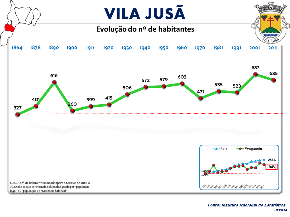 Evolução da População 1864 / 2011